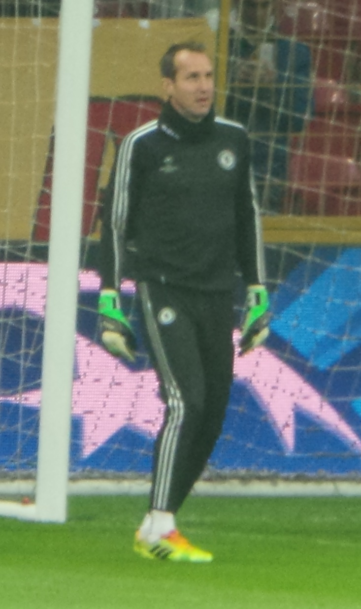 Mark Schwarzer @ Champ League match